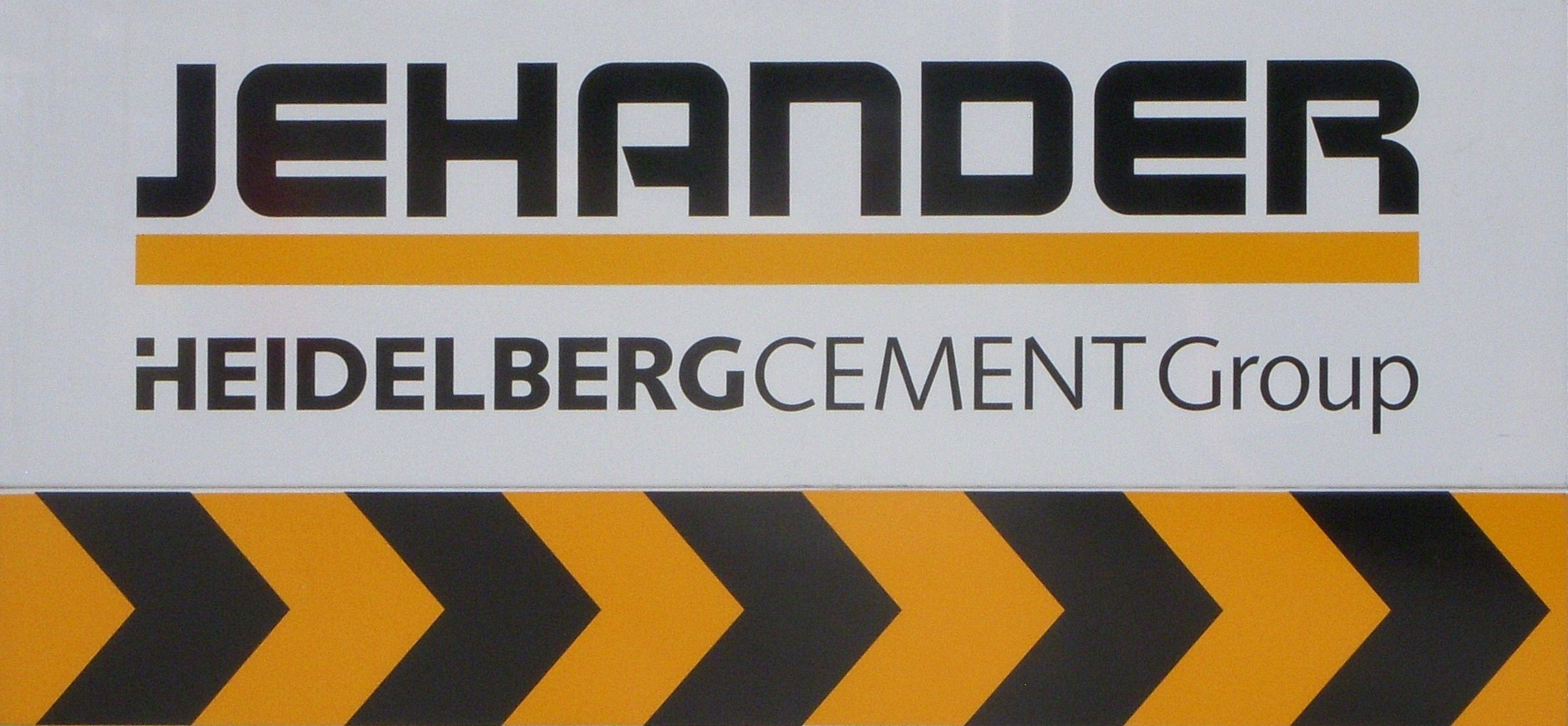 Jehandes skylt vid bygget av Tvärbanan, Ulvsunda